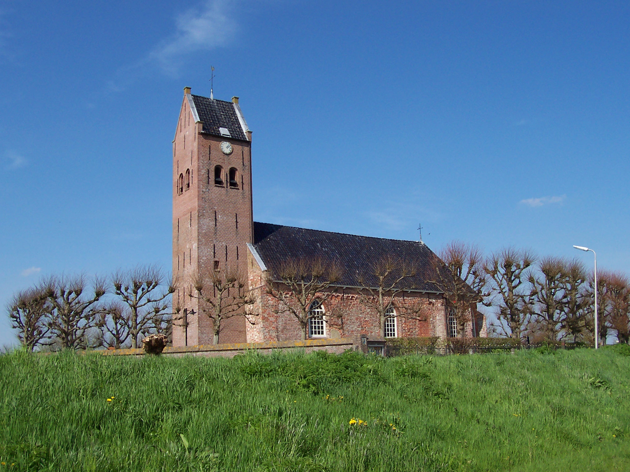 Swichum, Nicolaestsjerke